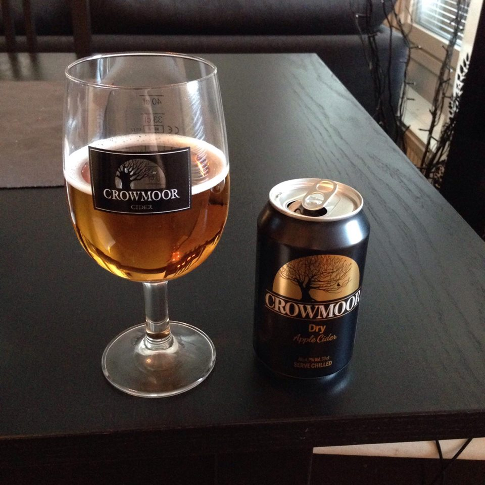 Crowmoor -tölkki sekä lasi, jossa Crowmoor -juomaa.